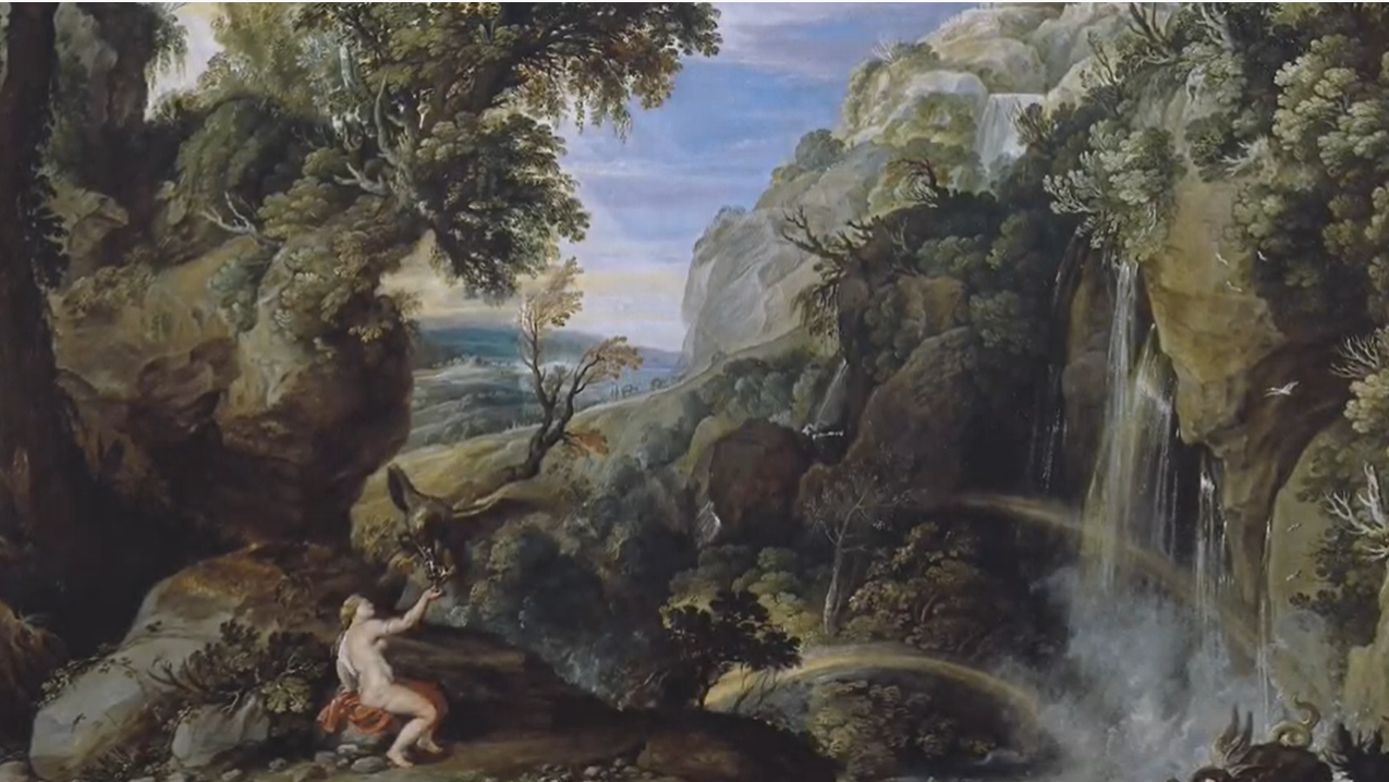 Paul Bril's painting changed by Peter Paul Rubens